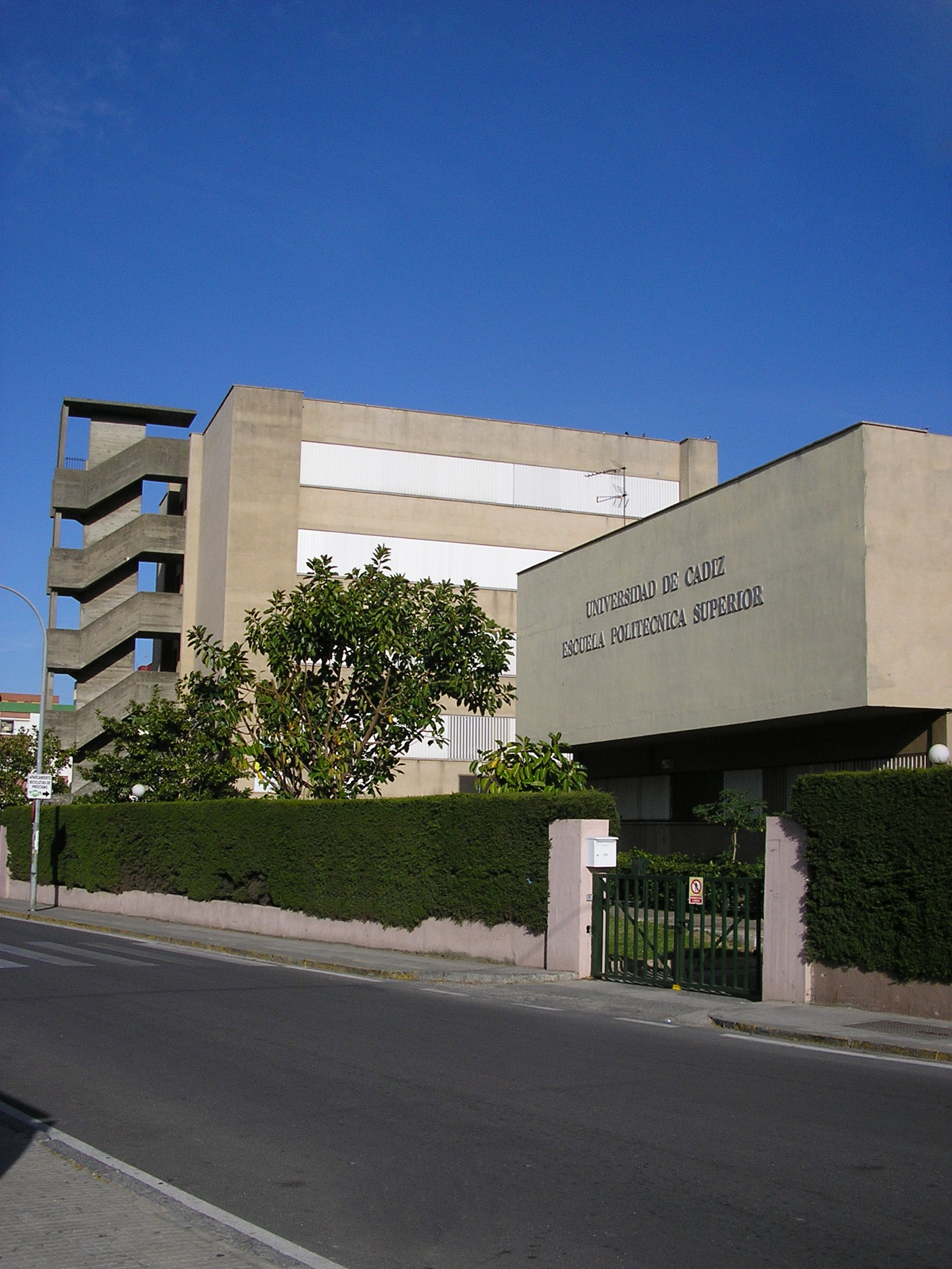 Escuela politécnica superior de Algeciras, Andalucía, España